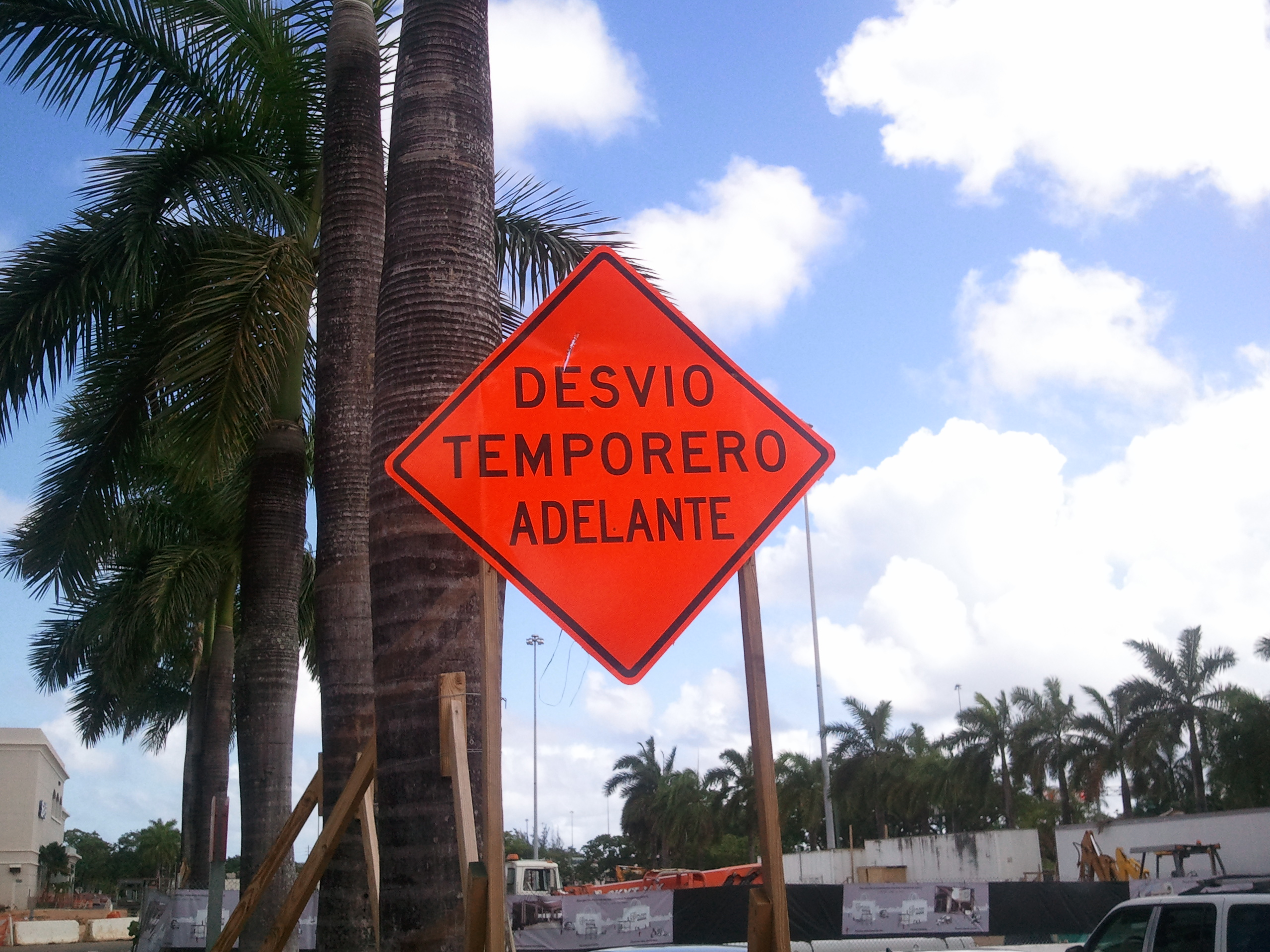 Señal de tráfico en San Juan de Puerto Rico, PR.